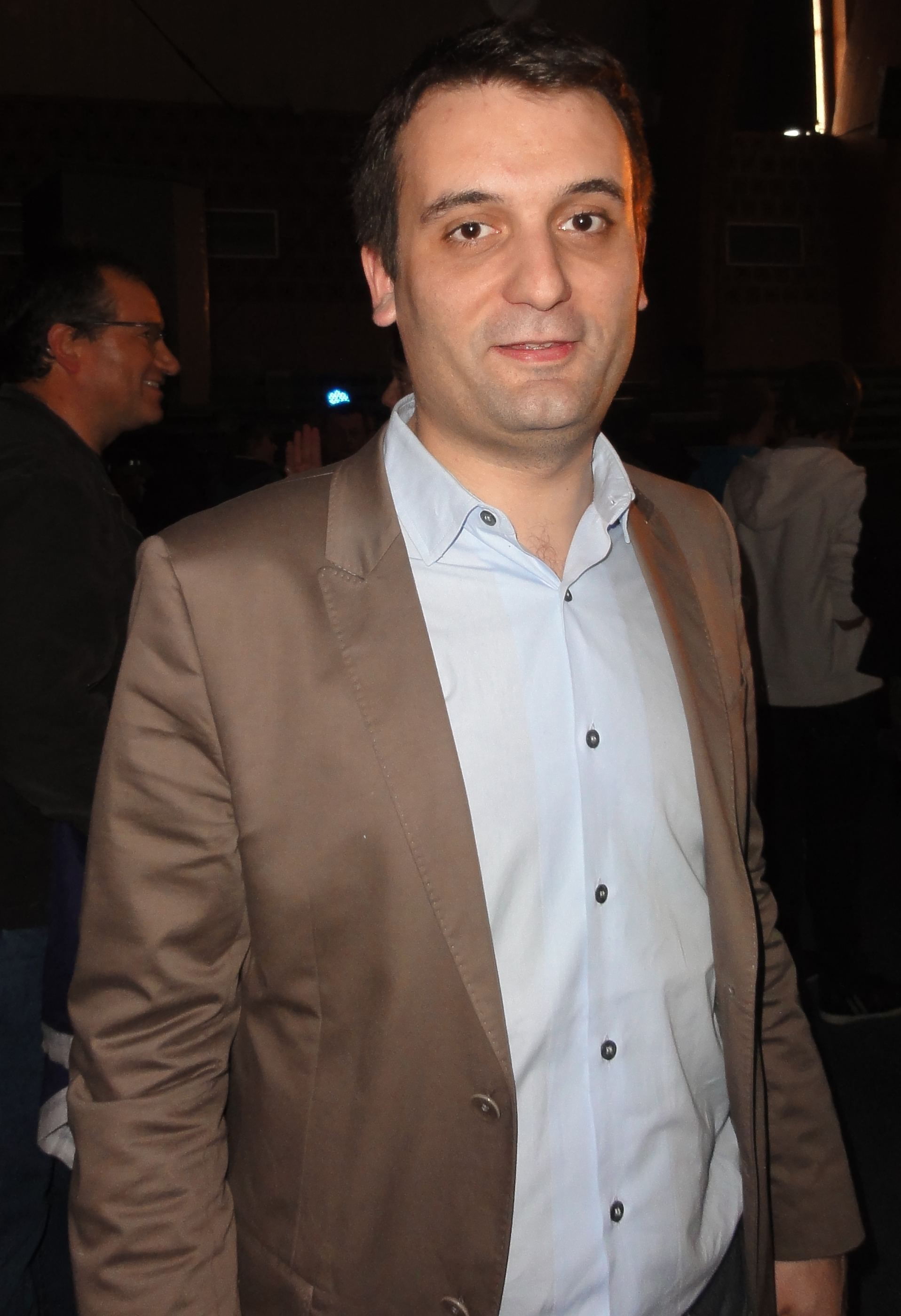 Florian Philippot à la réunion publique de Marine Le Pen le 15 avril 2012 à Hénin-Beaumont.